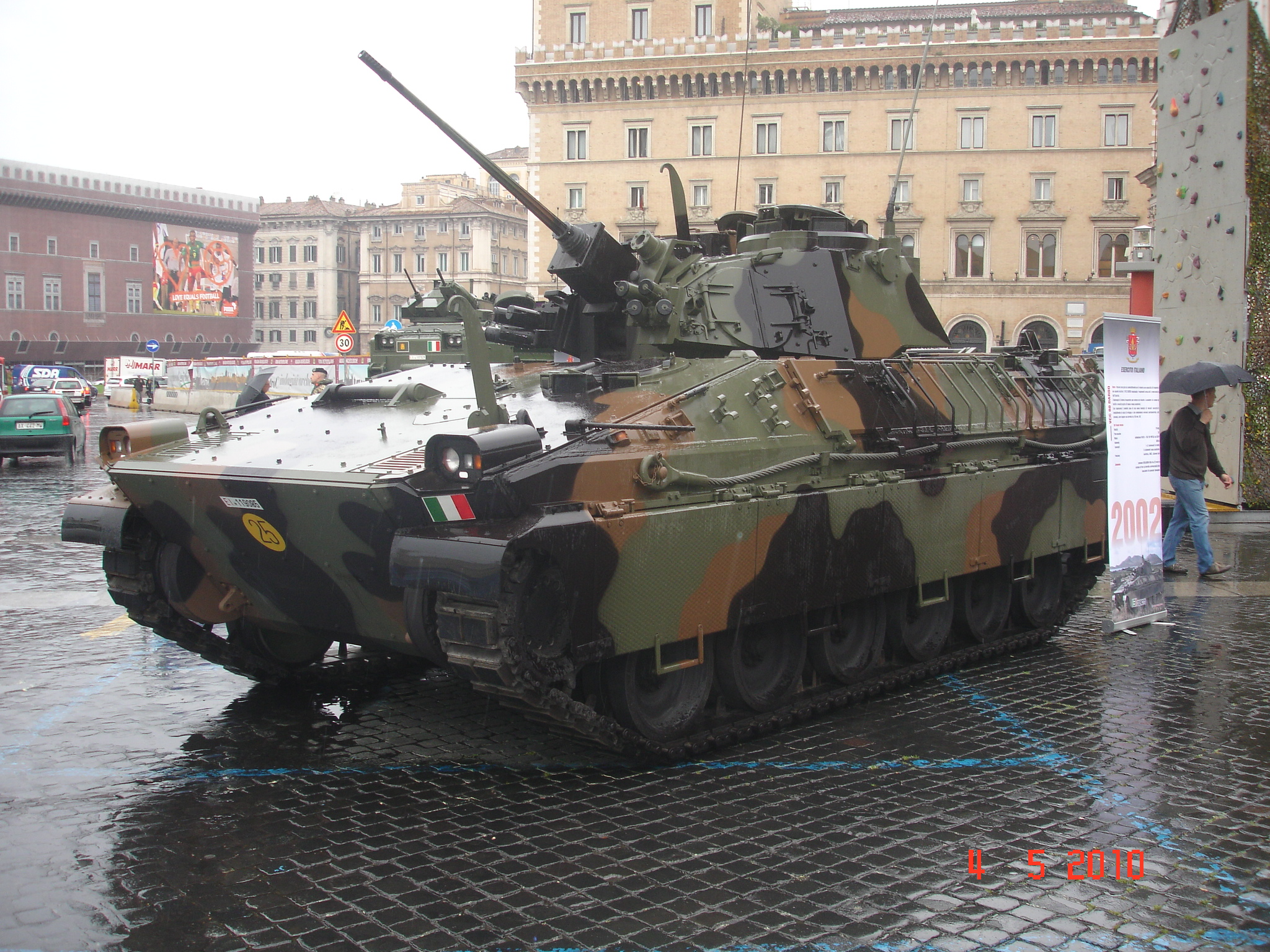 Carro leggero VCC Dardo esposto a piazza Venezia-Roma.